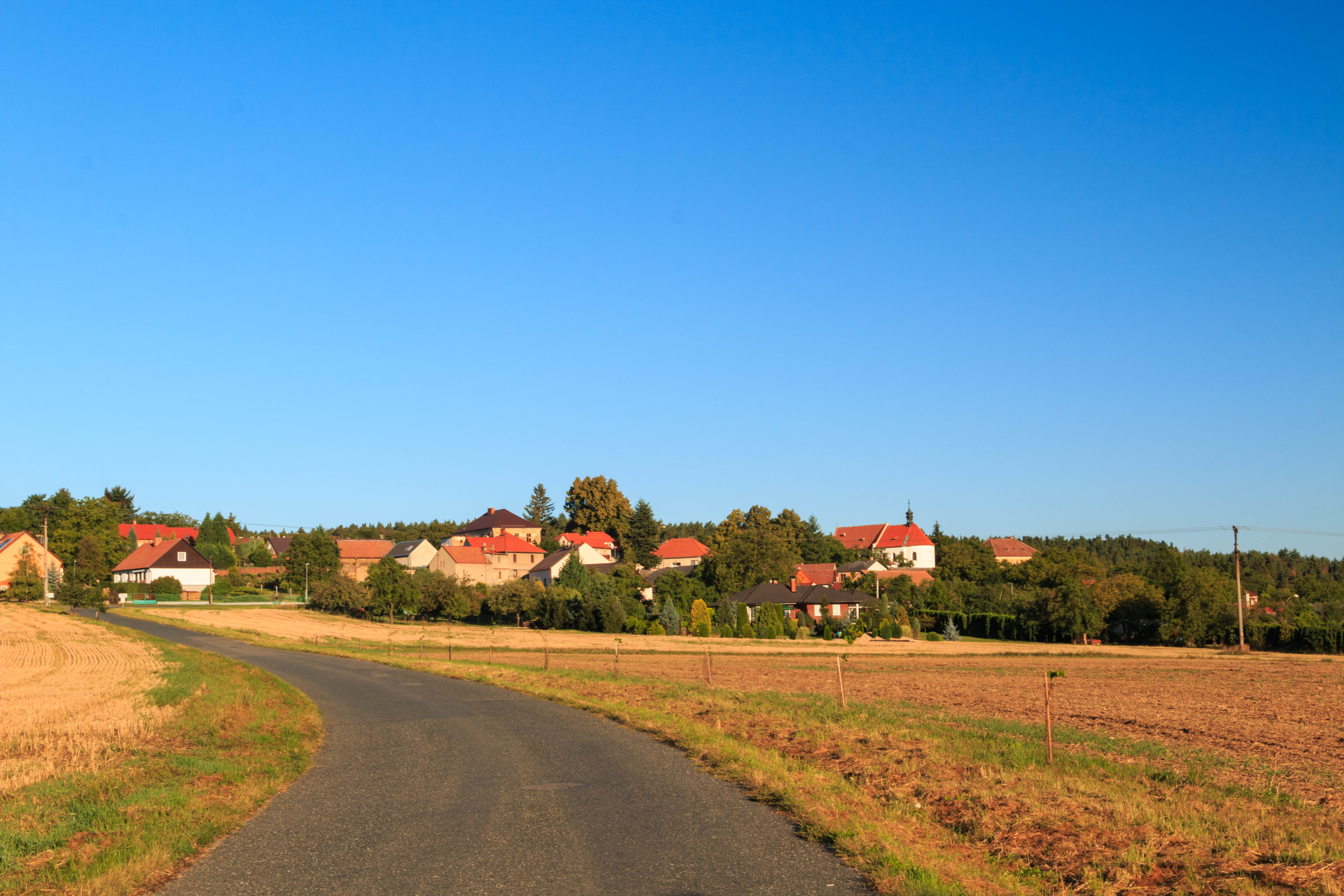 Třebonín od hlavní silnice